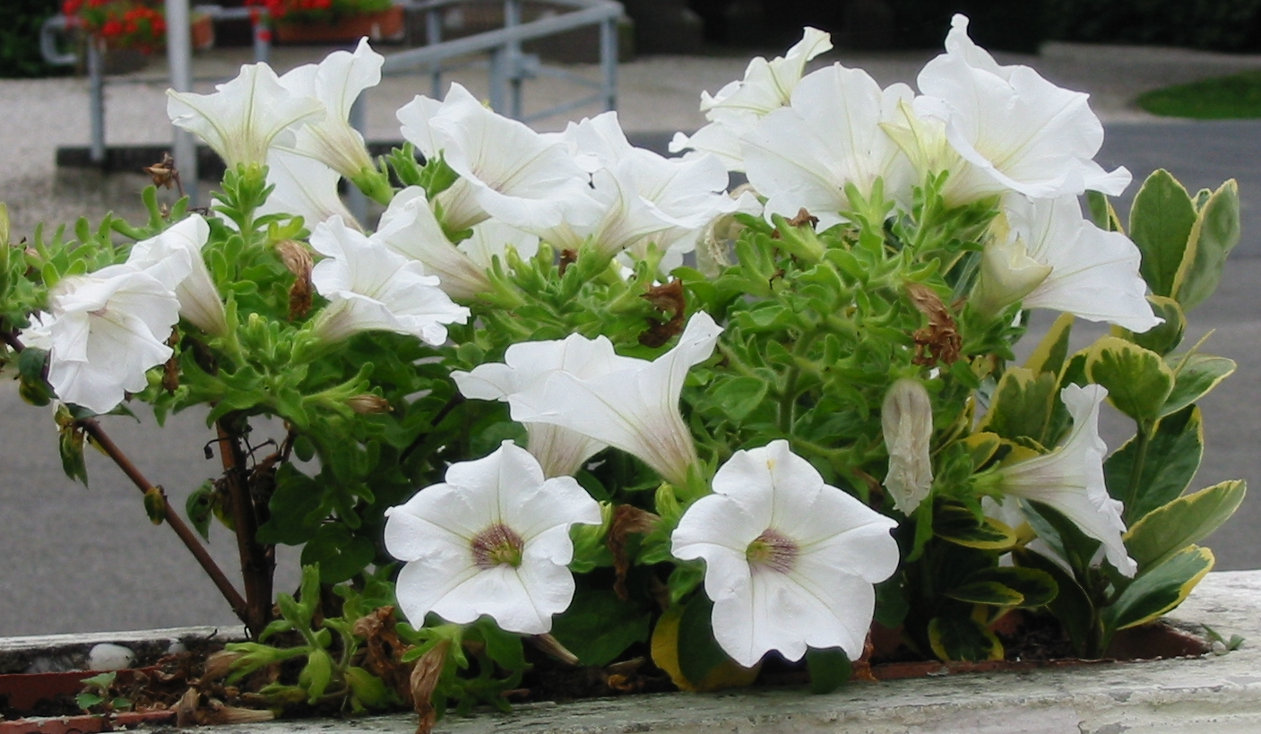 White Petunia picture